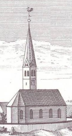 Ausschnitt Kupferstich von Michael Wening